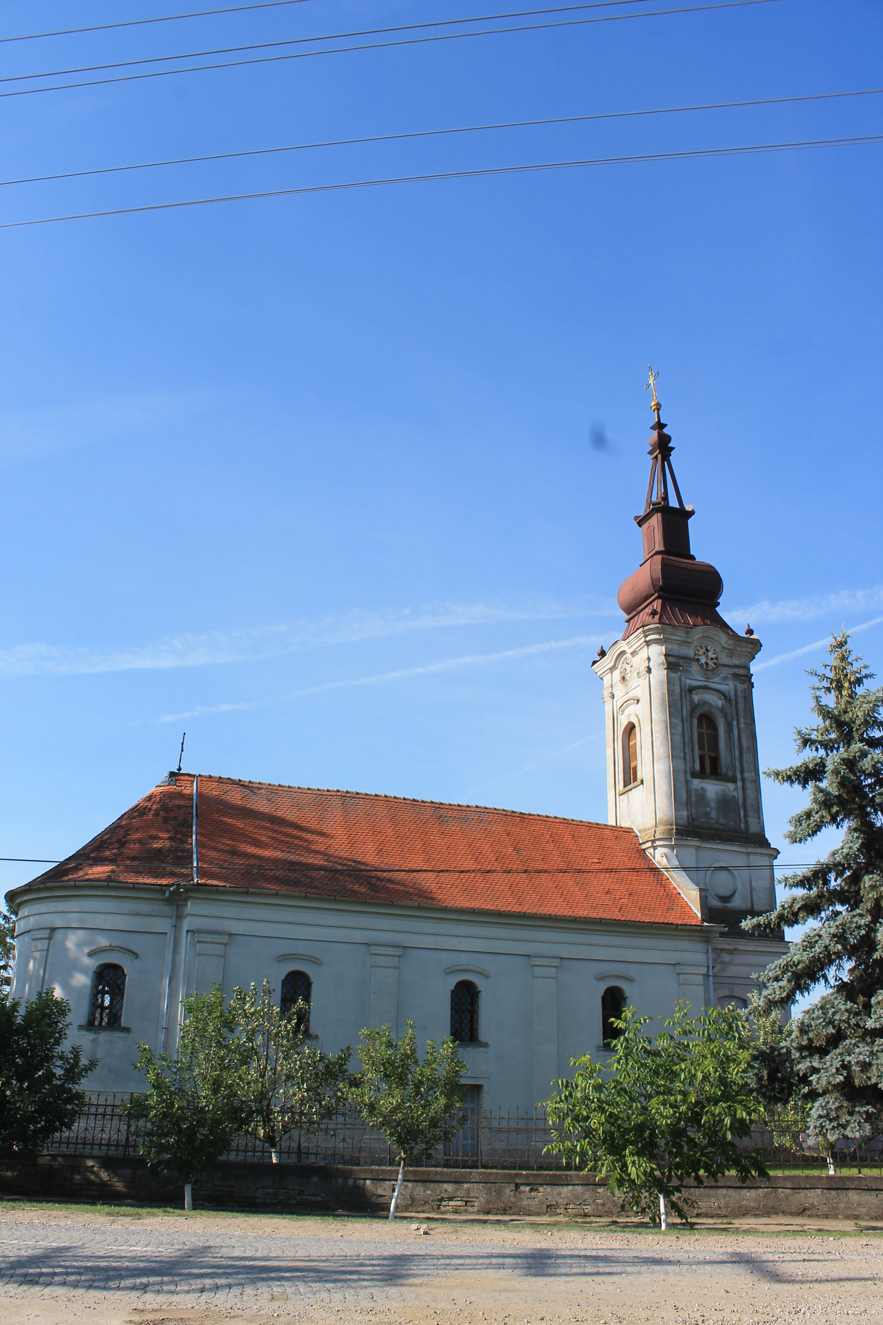 Buđanovci, crkva Sv. Mihaila i Gavrila